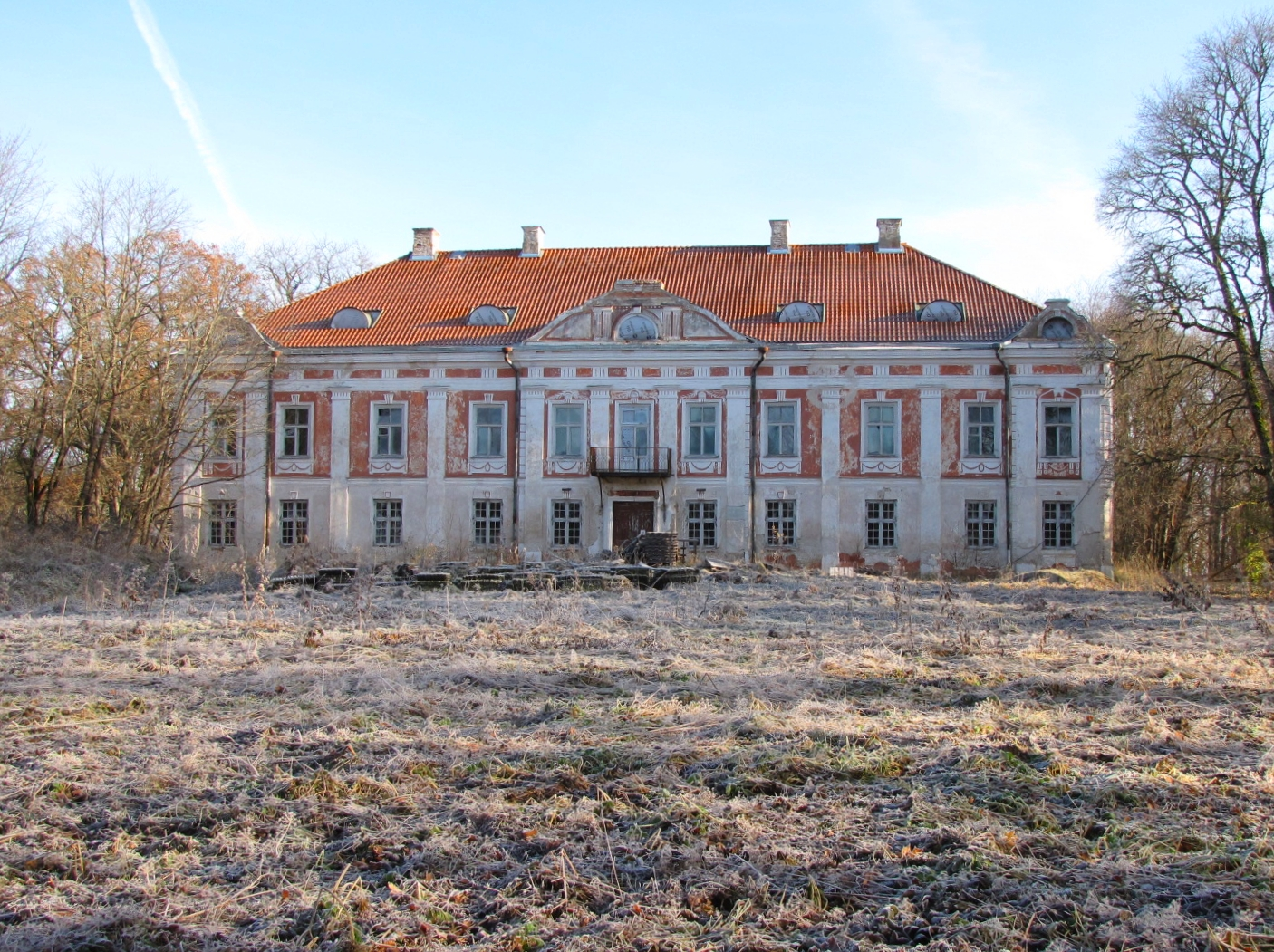 Liigvalla mõisa peahoone